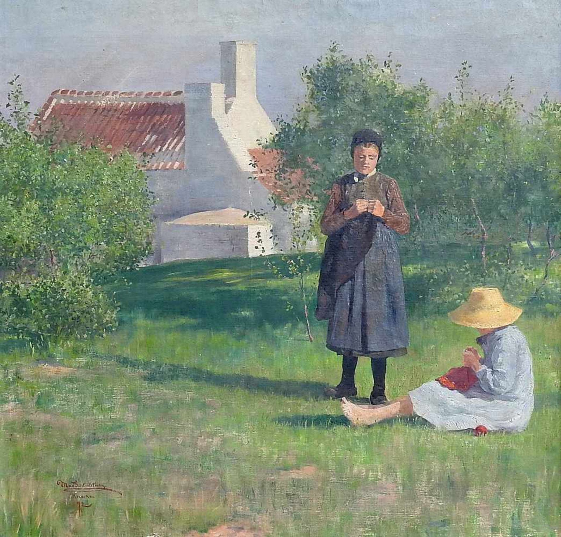 "Häkelnden Mädchen in Knokke, Belgien"